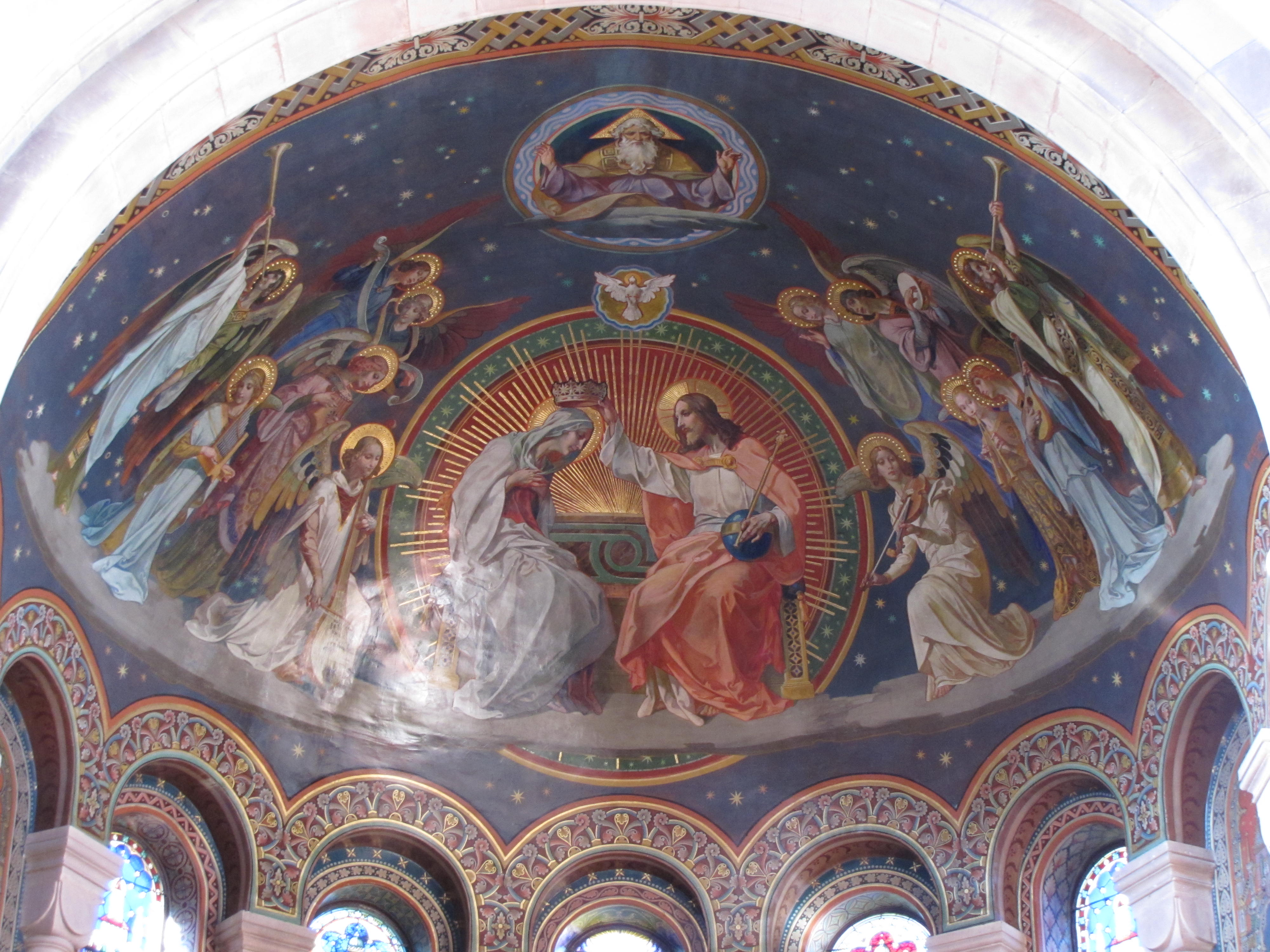 Alsace, Haut-Rhin, Gueberschwihr, Eglise Saint-Pantaleon, Peintures monumentales dans le choeur "Couronnement de la Vierge"